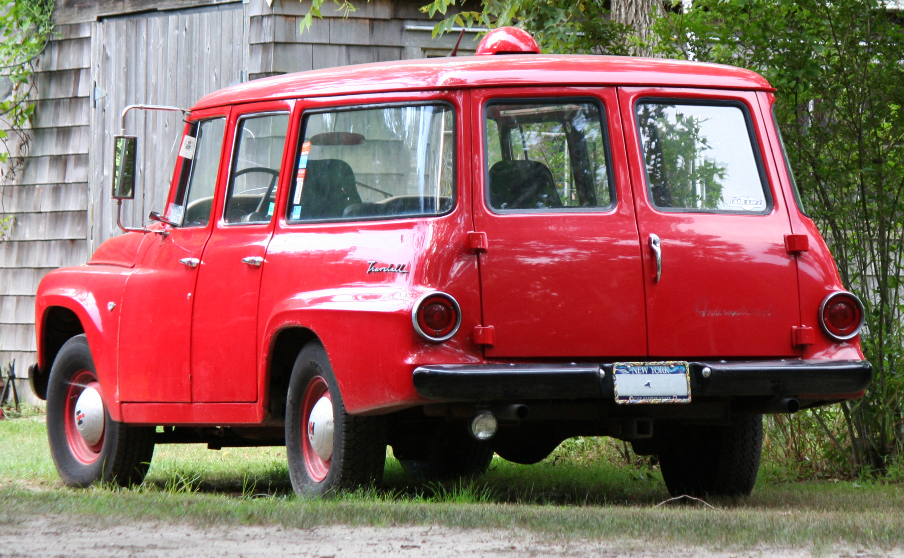 1965 International Travelall D1100